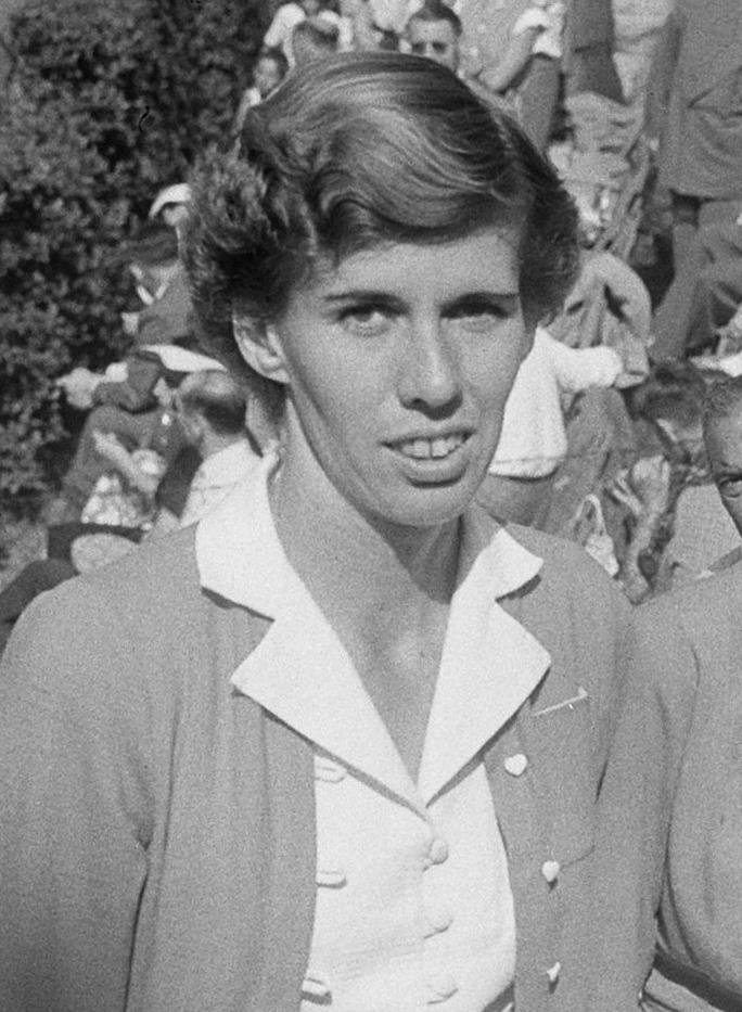 Tennis Noordwijk. Doris Hart